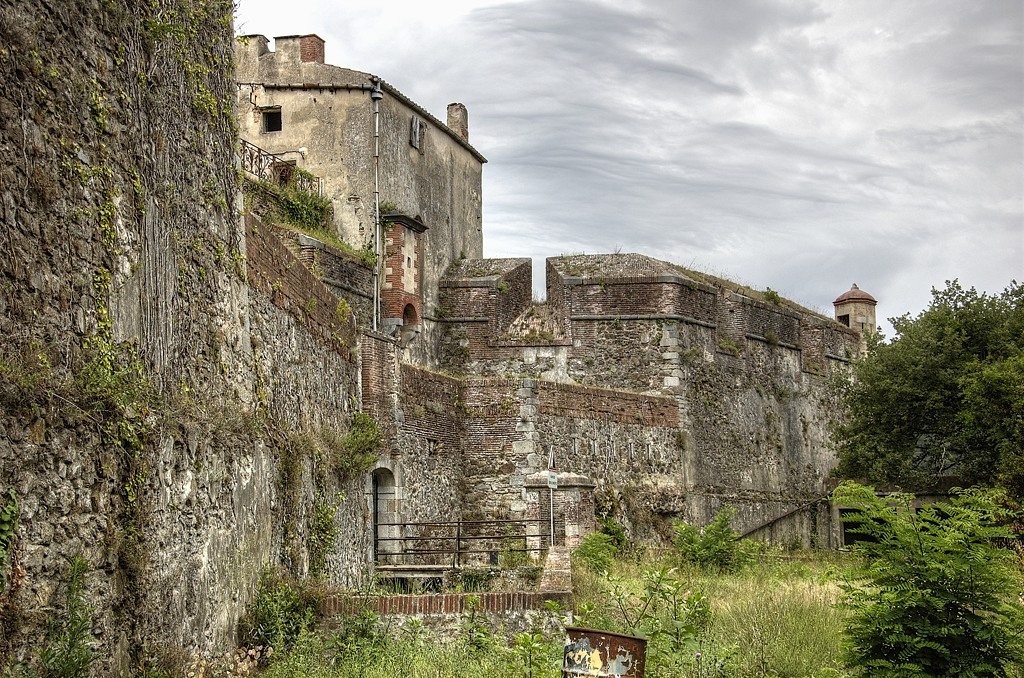 Fort les Bains, Amélie-les-Bains-Palalda (Pyrénées-Orientales, Languedoc-Roussillon, France)